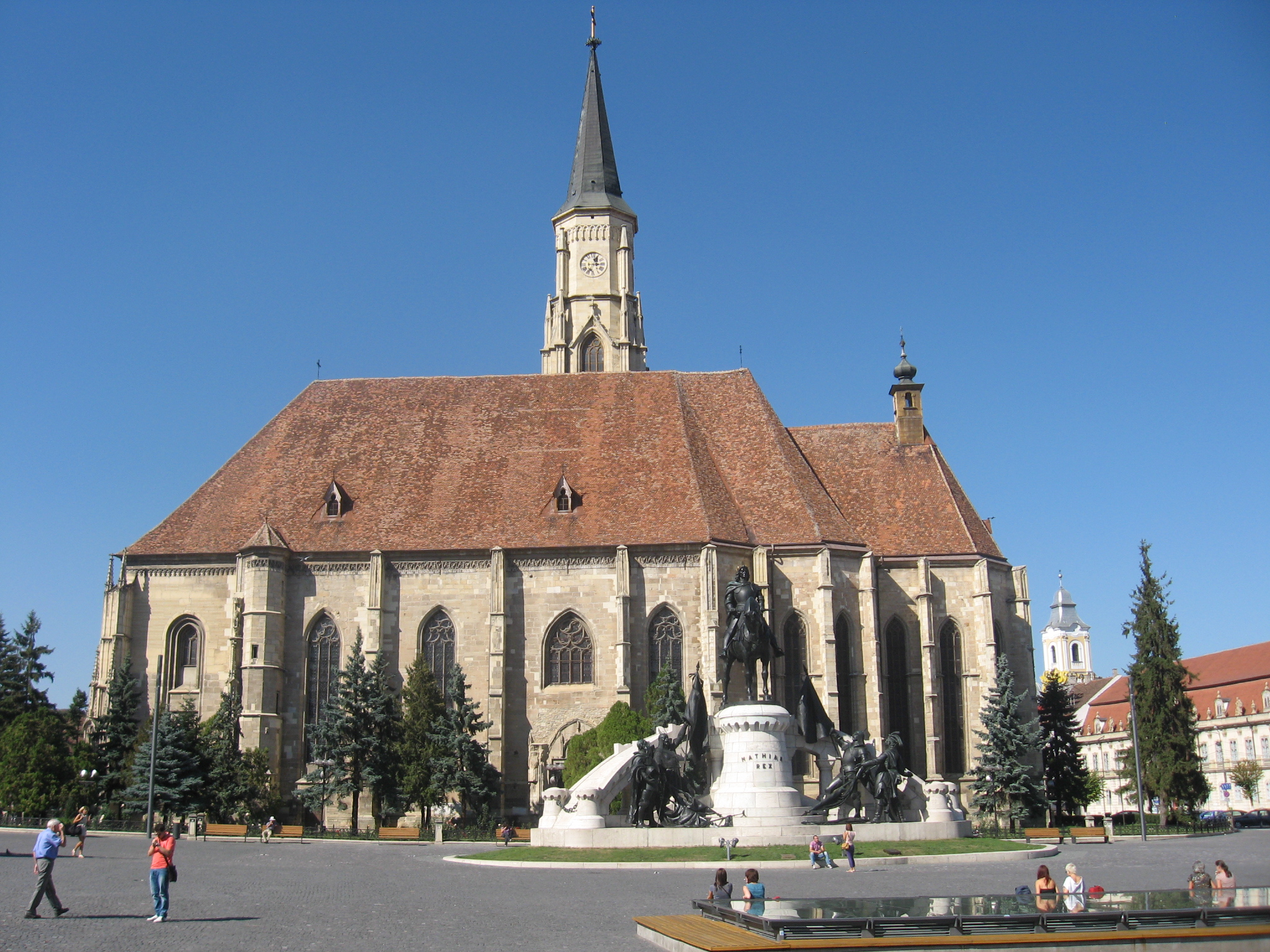 A Fő tér a Mátyás-szoborral és a Szent Mihály-templommal